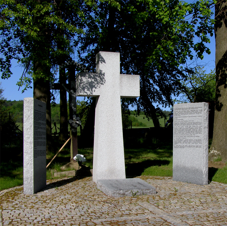 Pamätník padlým vojakom z prvej svetovej vojny